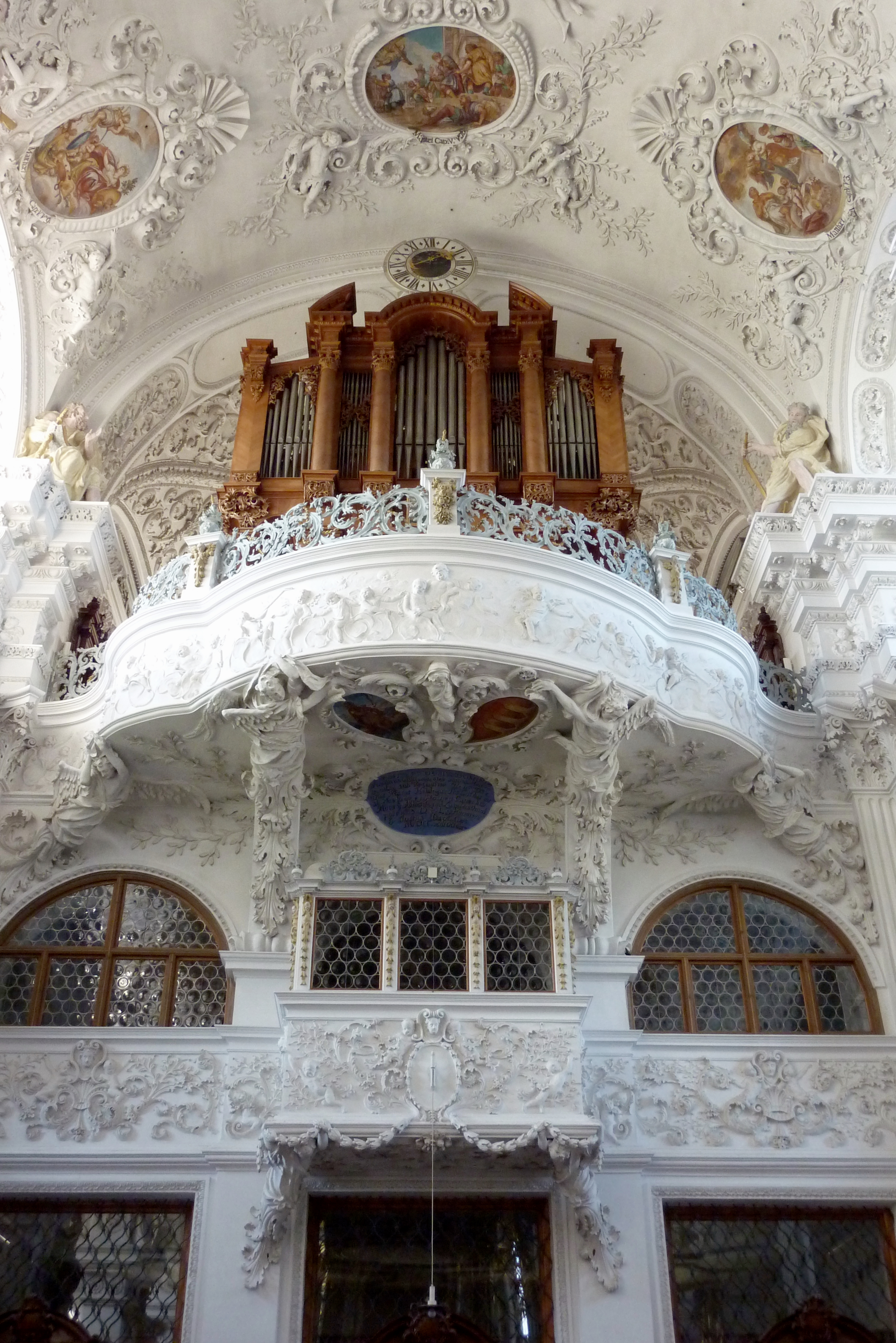 Kirche St. Johannes der Täufer des ehemaligen Benediktinerinnenklosters Kloster Holzen in Allmannshofen im Landkreis Augsburg (Bayern), Orgelempore